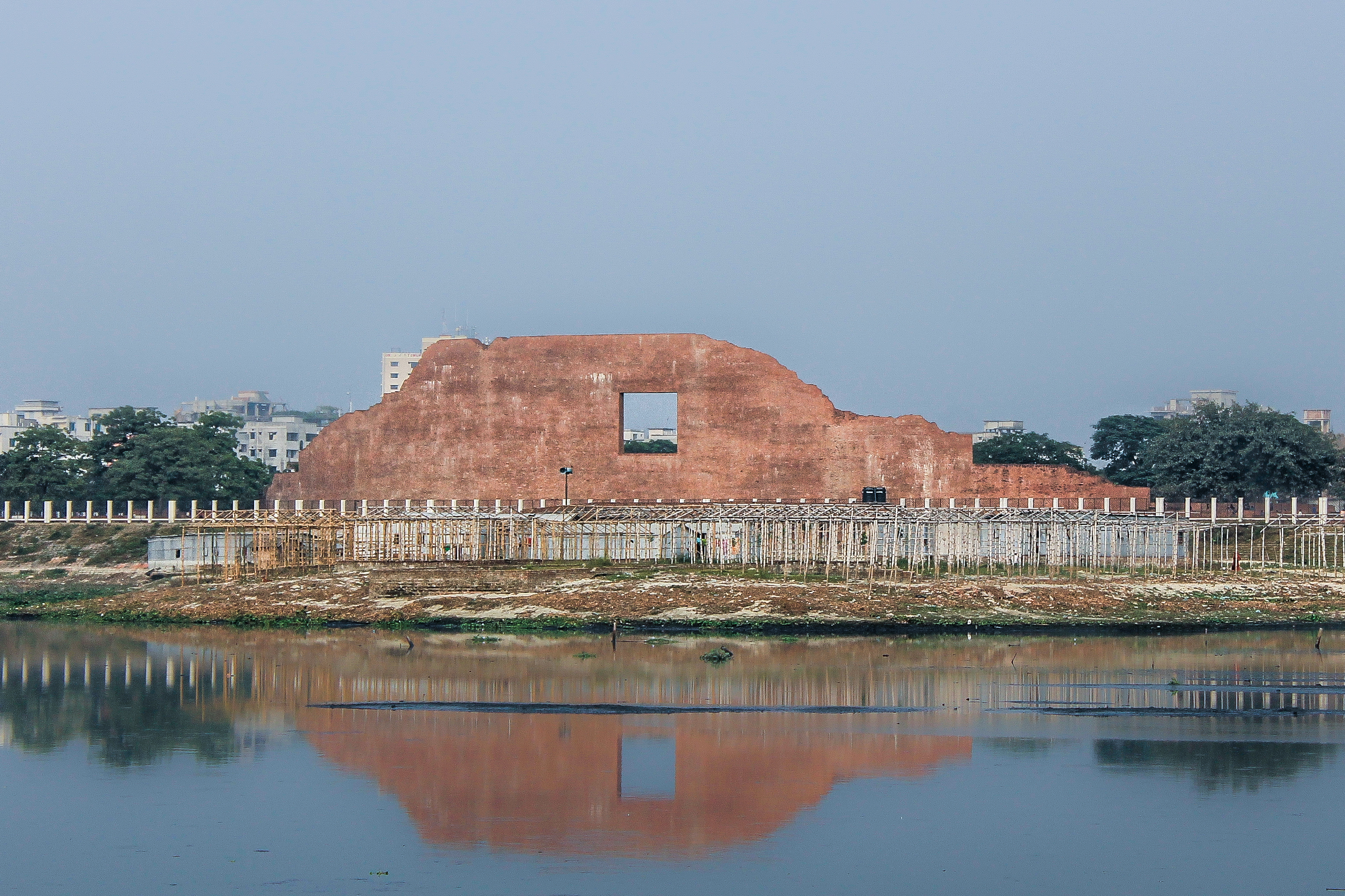 শহীদ বুদ্ধিজীবী স্মৃতিসৌধ